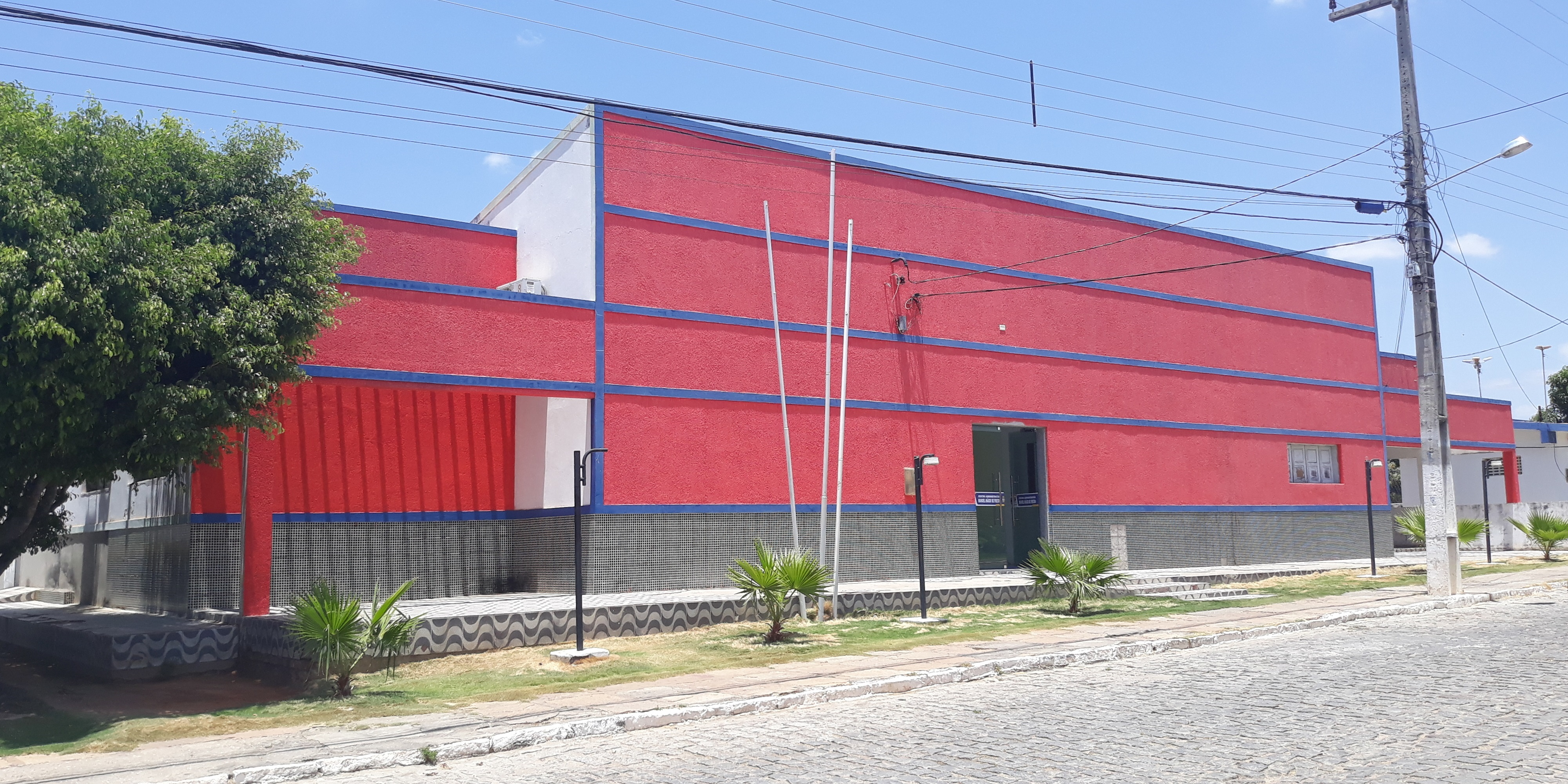 Português do Brasil: Centro Administrativo Manoel Inácio de Freitas, sede da prefeitura de Taboleiro Grande, Rio Grande do Norte (Brasil)